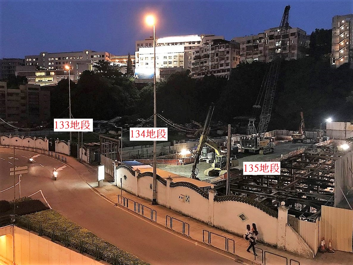 Constructions under Guia Mountain.